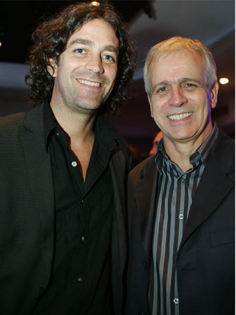 Felipe Brown y Augusto Góngora Almuerzo en Hotel O'Higgins (2009).